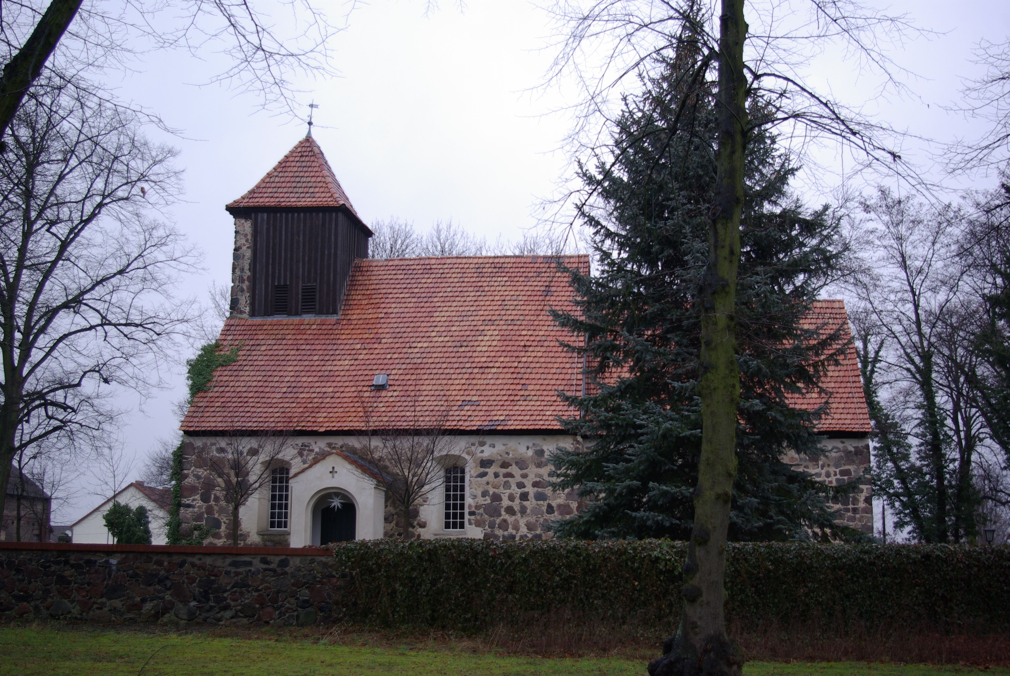 Königs Wusterhausen Ortsteil Deutsch Wusterhausen in Brandenburg. Die Kirche am Denkmalsplatz steht unter Denkmalschutz.